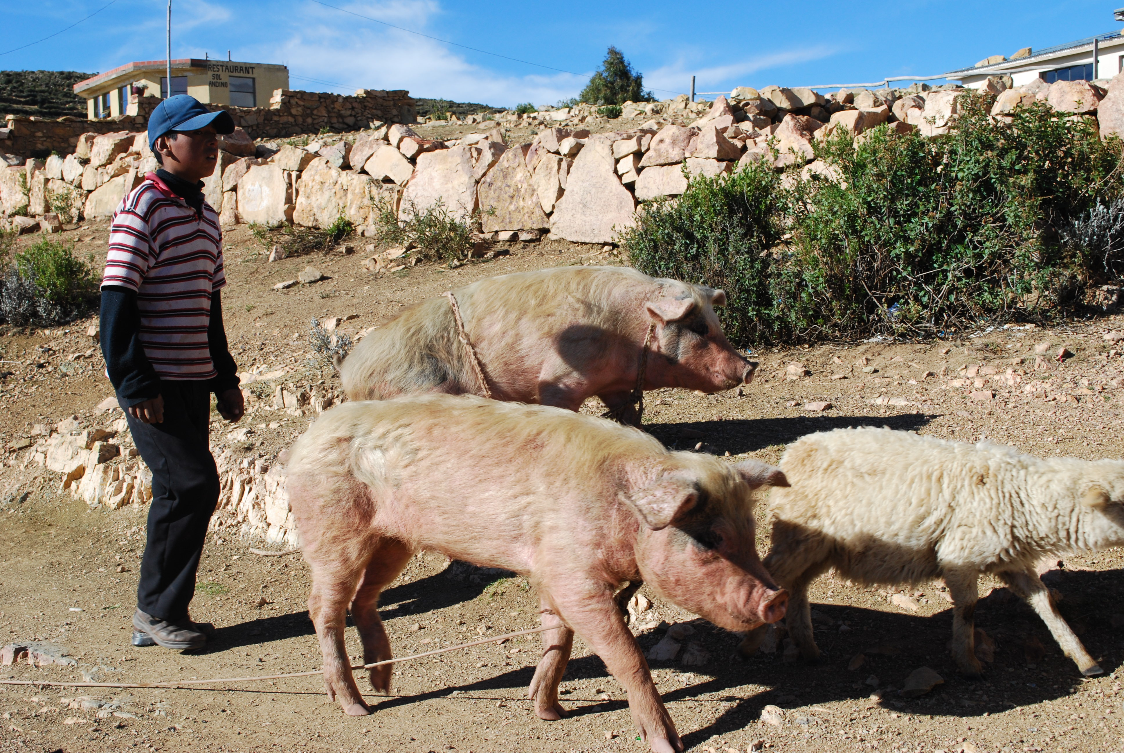 Agriculture in Bolivia.